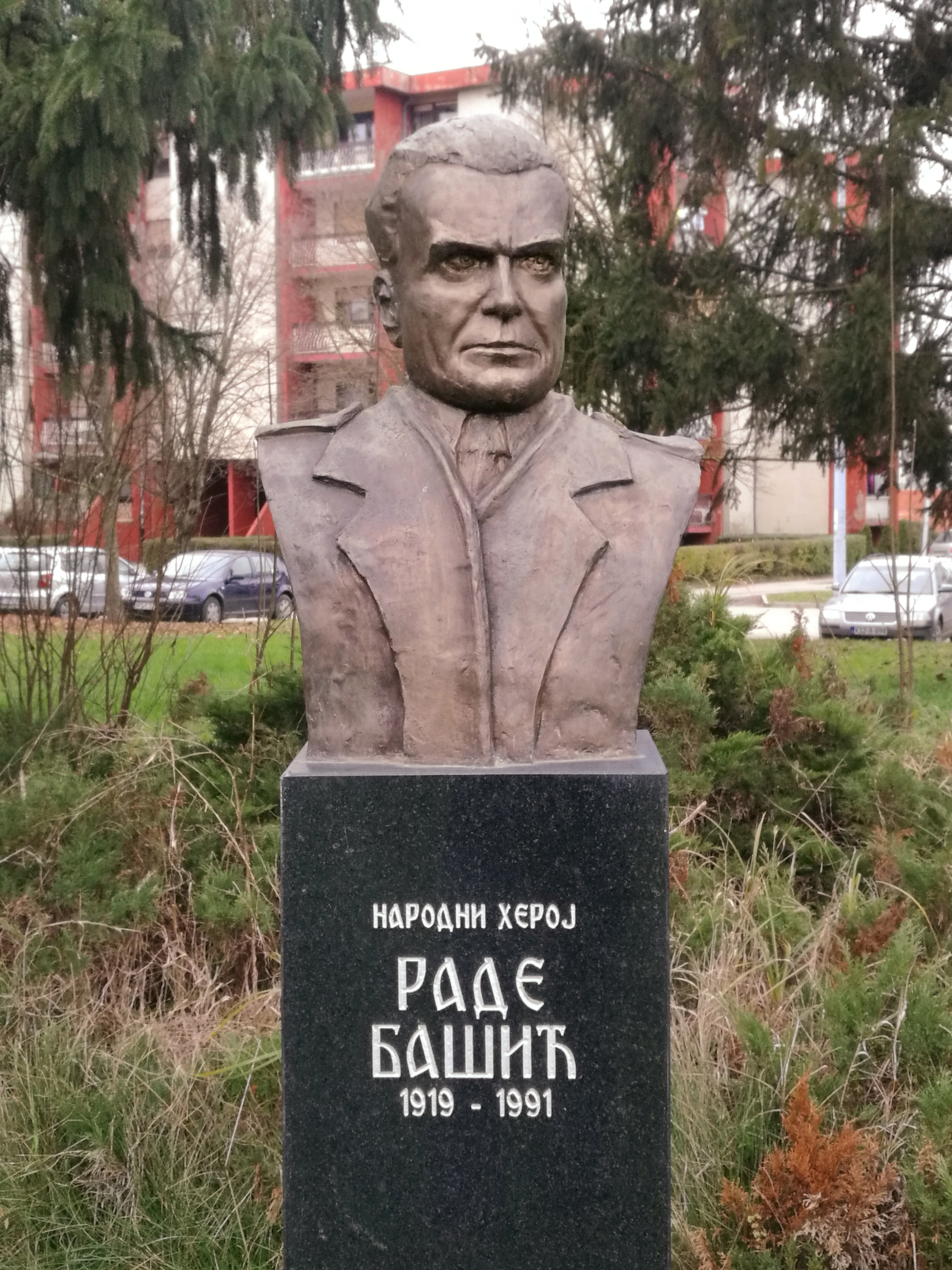 Spomenik narodnom heroju Radetu Bašiću u Prijedoru